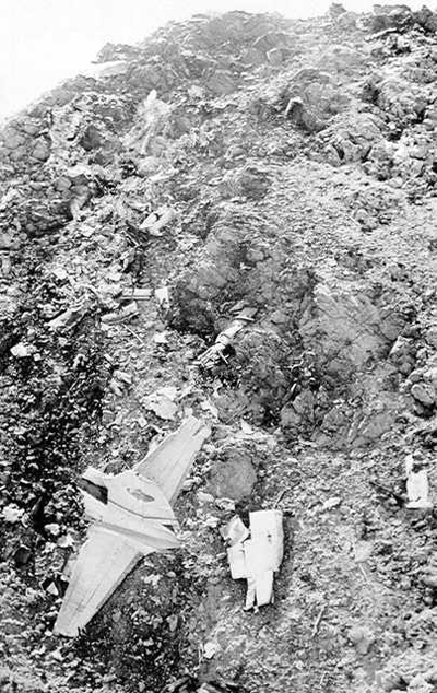 Катастрофа Convair 440 под Бишопом